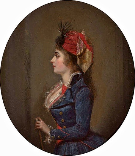 Frühes Porträt von Joséphine de Beauharnais (1763-1814), der künftigen Gattin Napoleons und Kaiserin der Franzosen, in blauweißroter Kleidung, wie sie am Föderationsfest (erster Jahrestag des Bastillesturms) getragen wurde, und mit kreolischem Kopfputz.